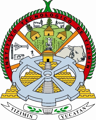 Logotipo del Instituto Tecnológico de Tizimín.